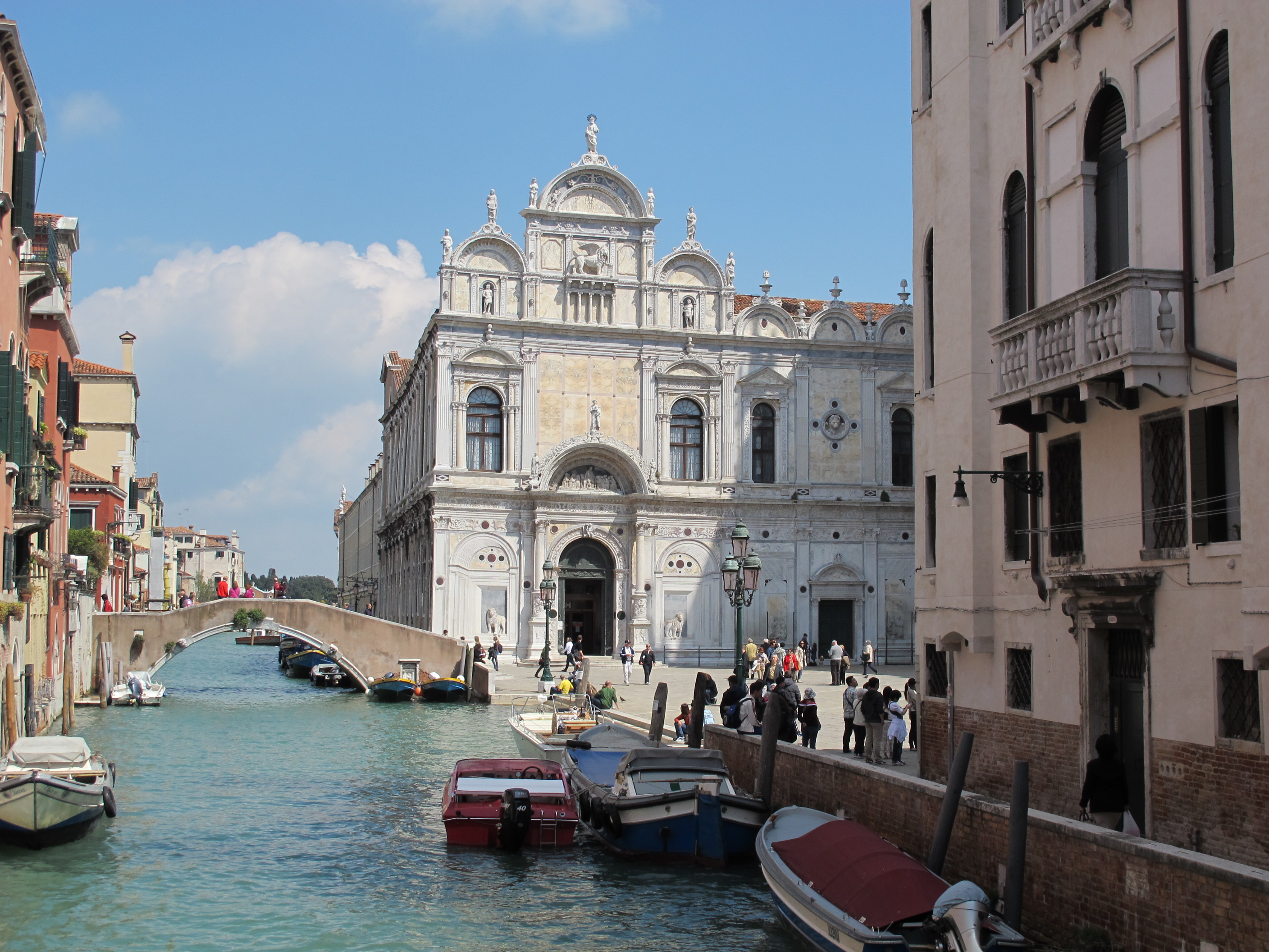 Venezia, scuola di san marco